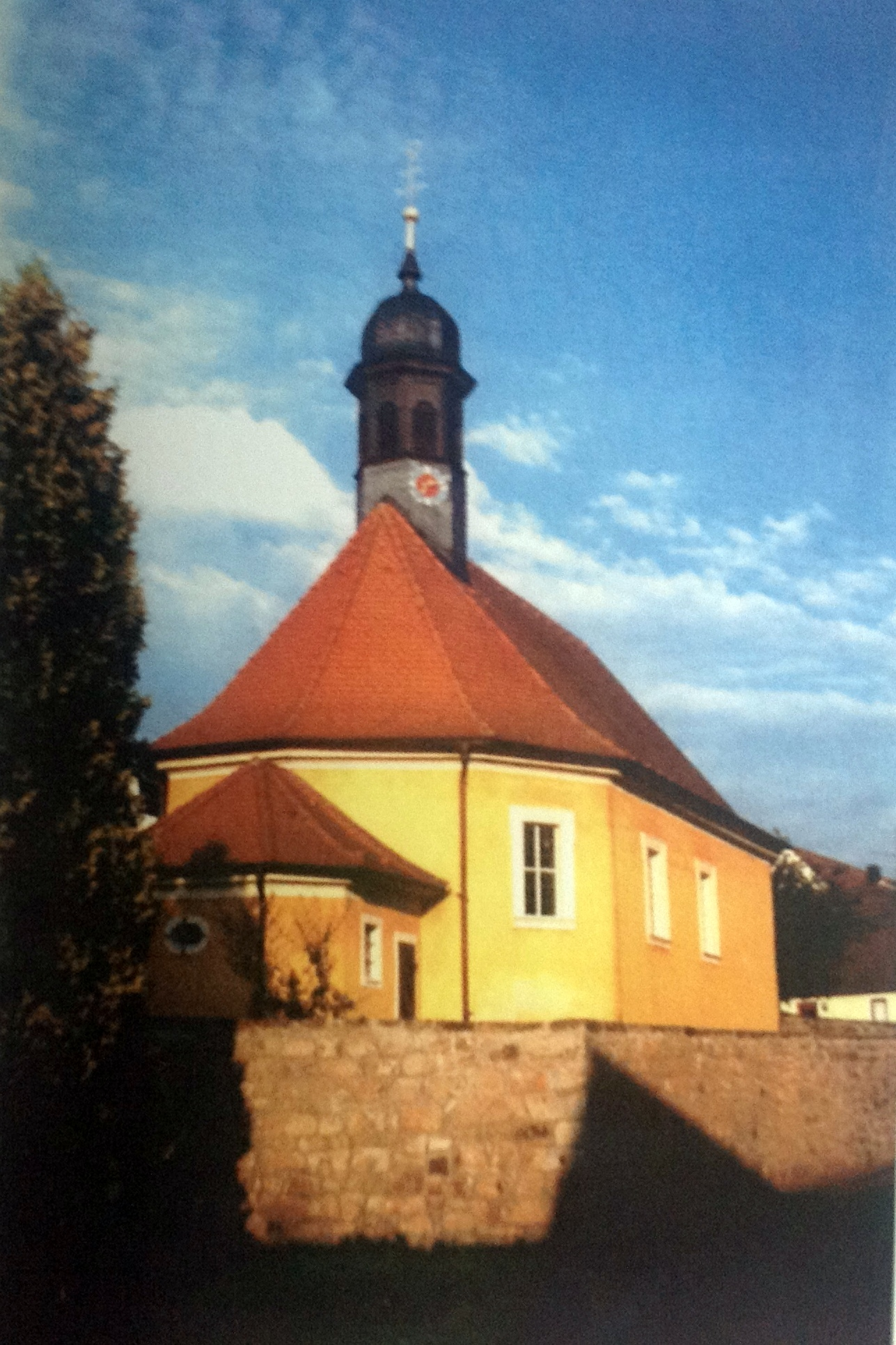 Filialkirche, Pfarrei Schlüsselfeld